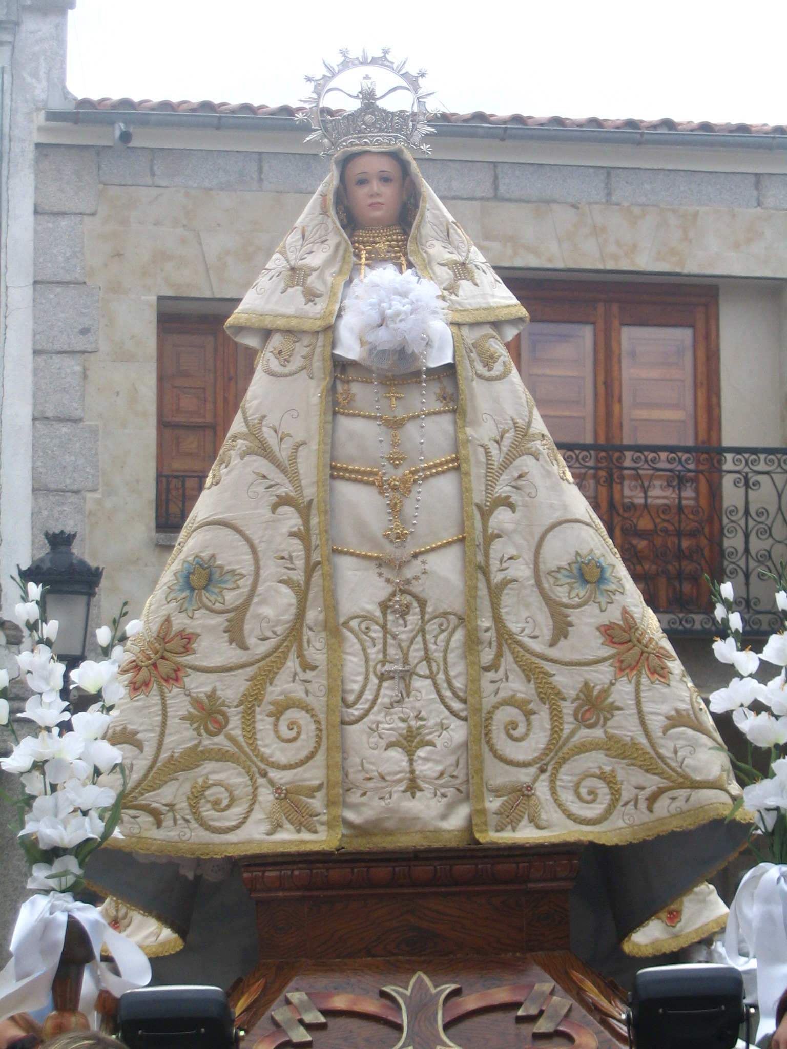 Virgen de la Encina, patrona de Macotera